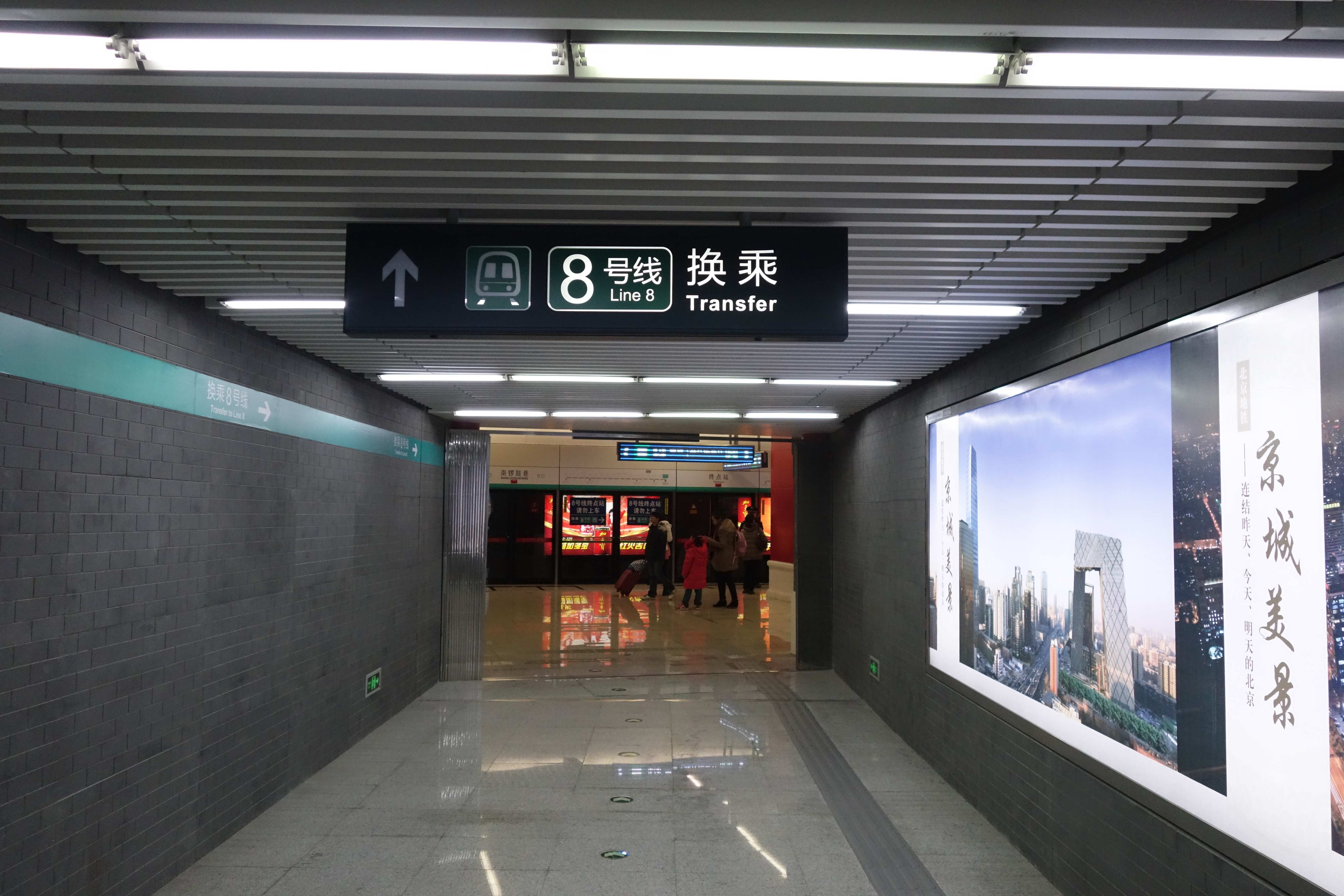 南锣鼓巷6号线站台换乘8号线通道